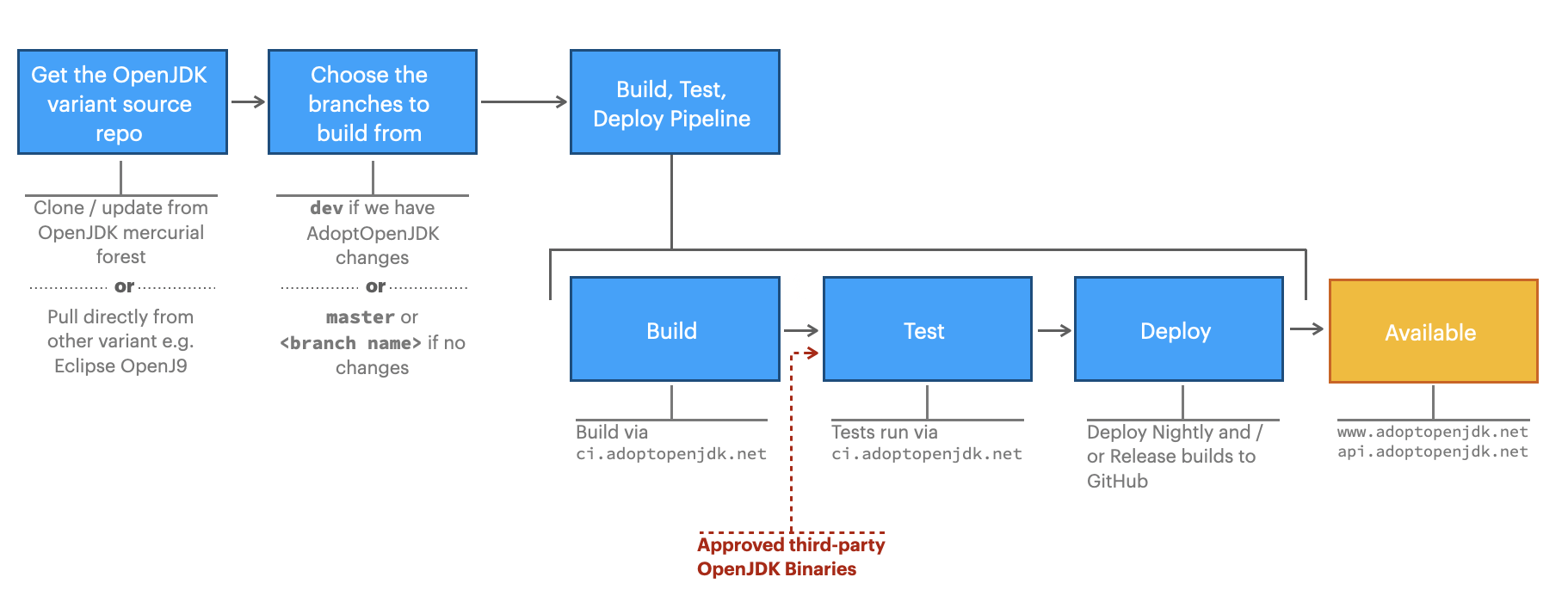 This images shows the workflow to build, test and distribute Java binaries